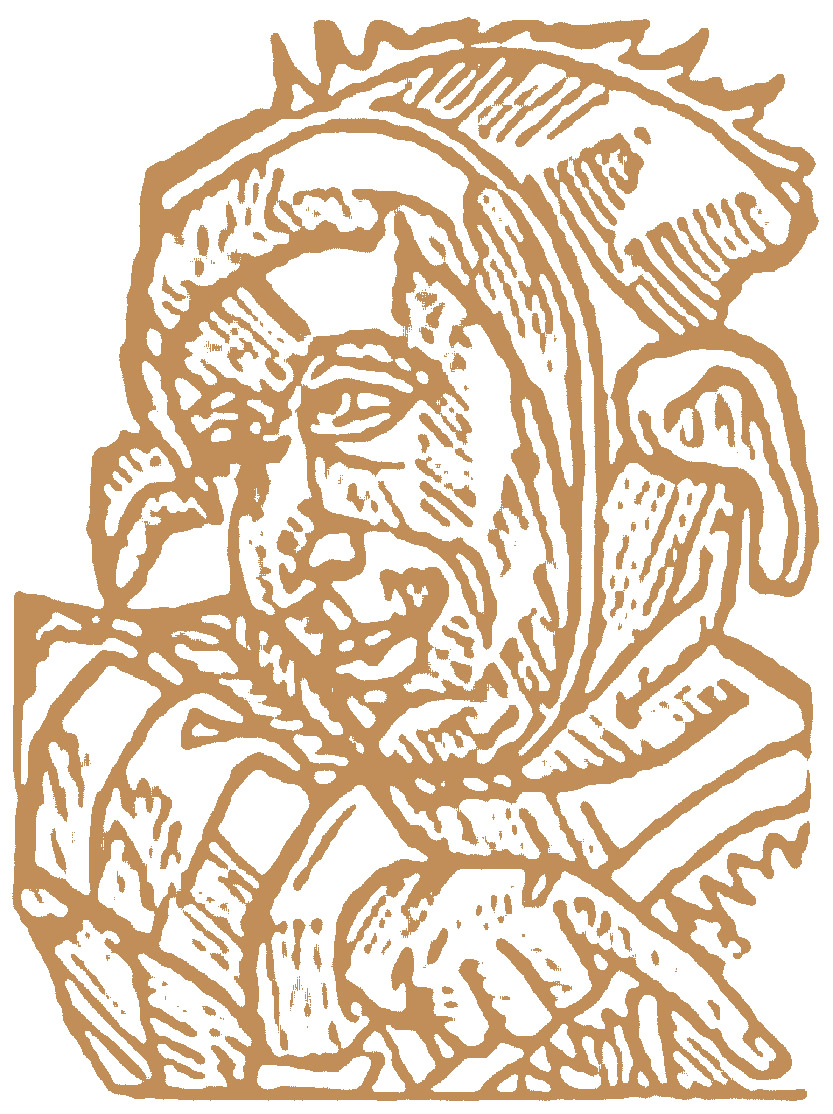 Tegning af broder rus